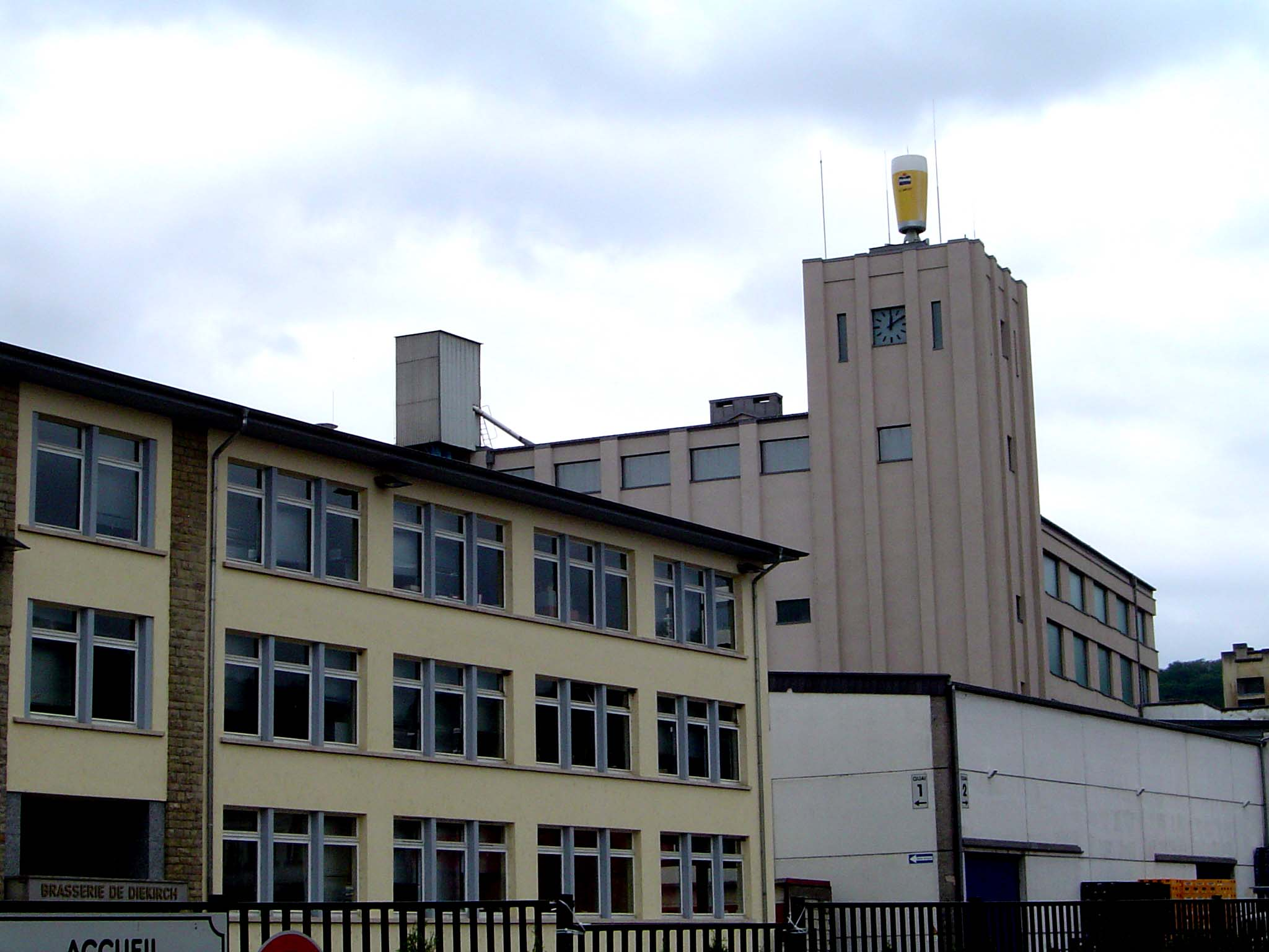 Brasserie du Luxembourg (Diekirch).